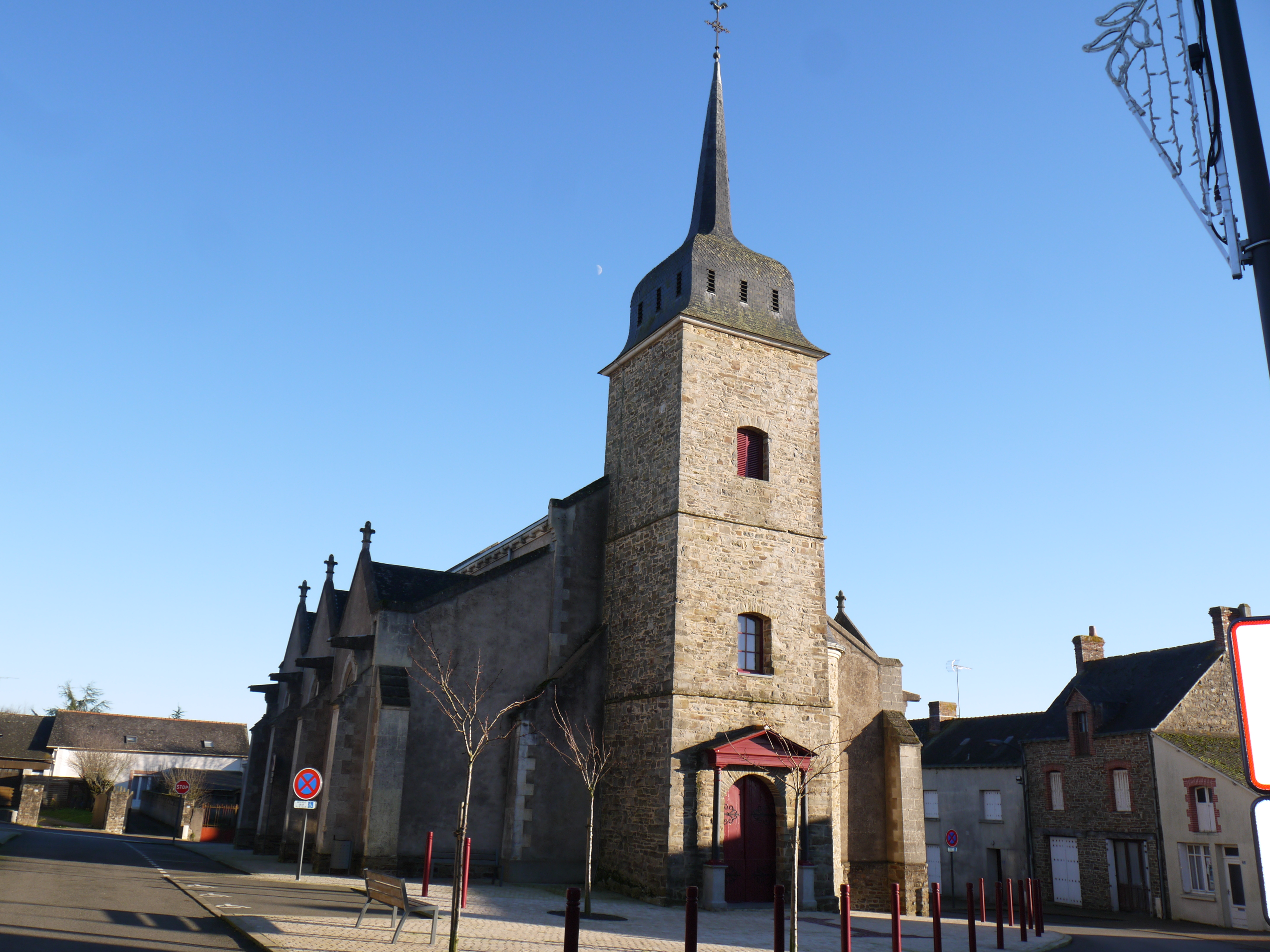 Eglise de Fercé